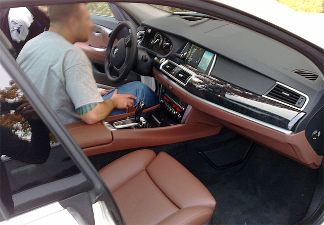 BMW 5er GT vor seiner Veröffentlichung